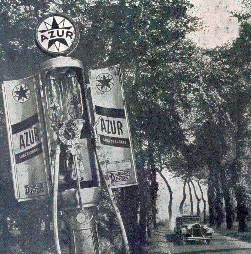 Pompe essence Azur, carburant de la société Desmarais frères, intégrée au groupe Total en 1964 (publicité de 1934).